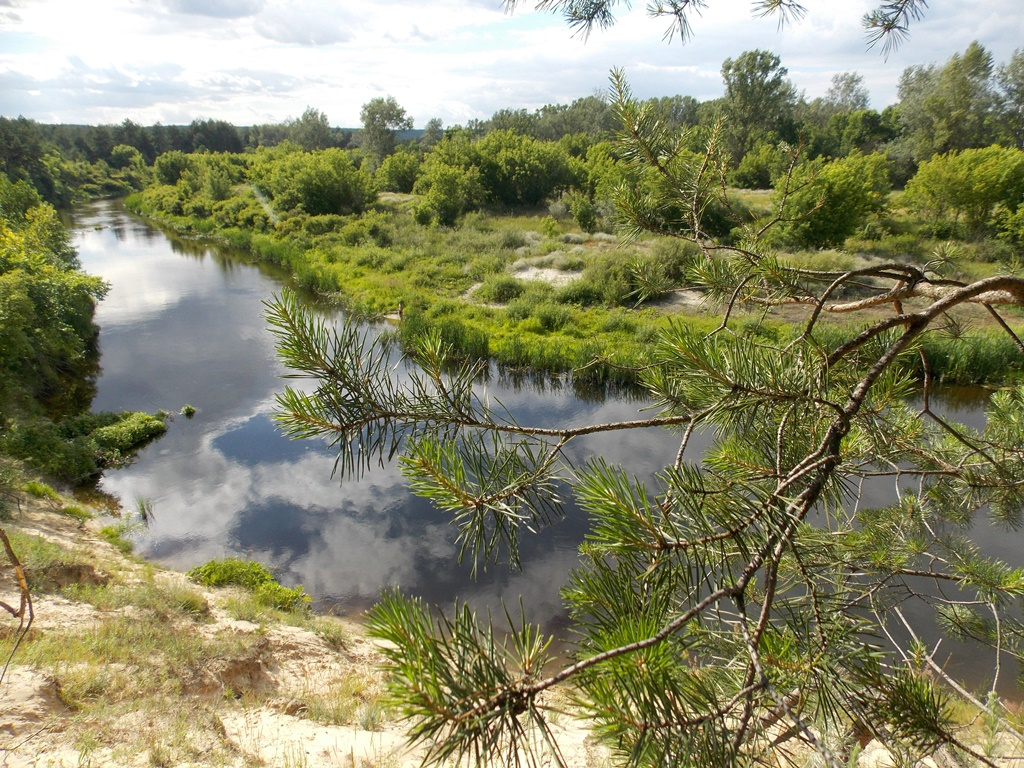 ріка Ворскла